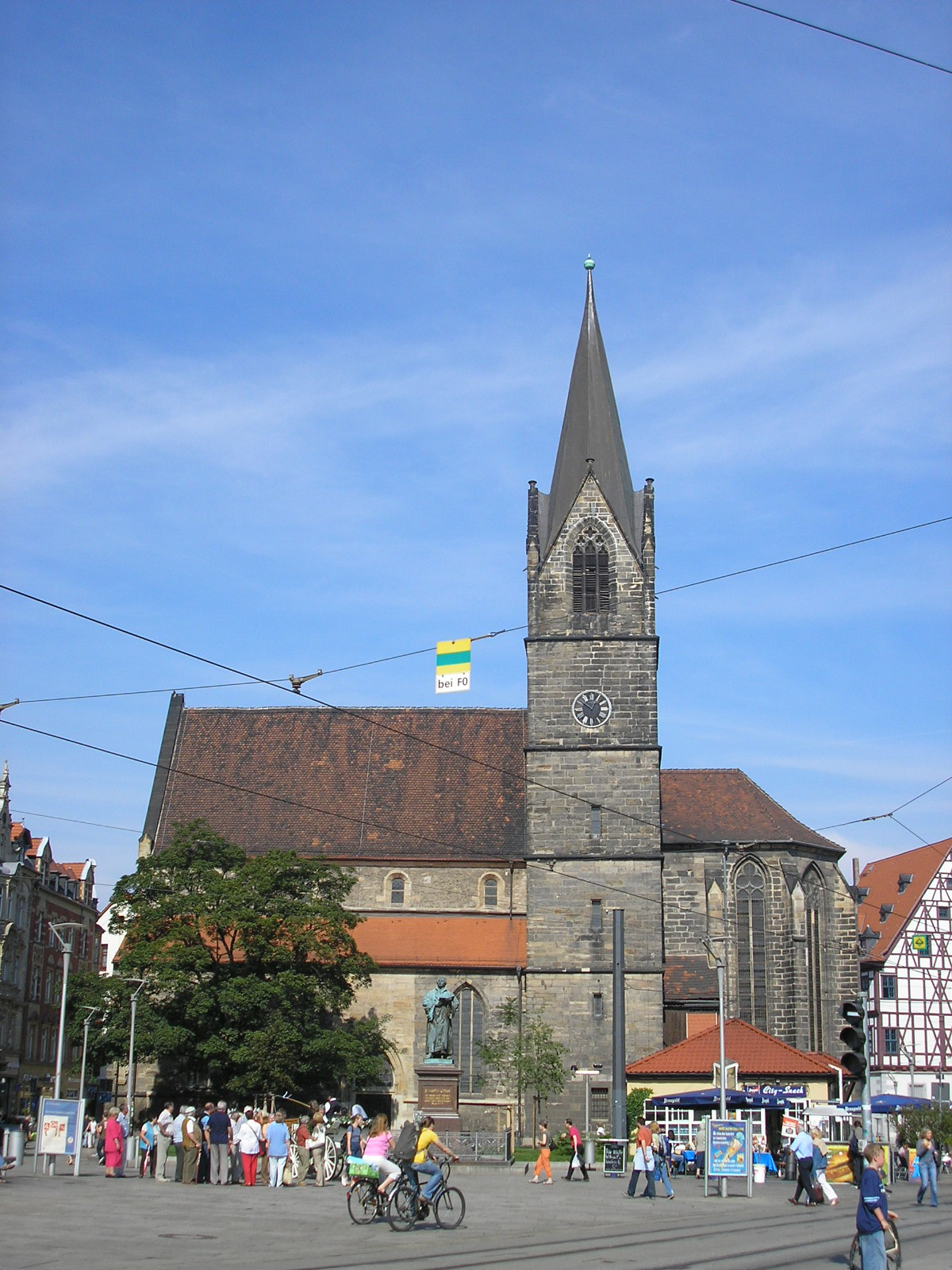 Kaufmannskirche am Anger in Erfurt.